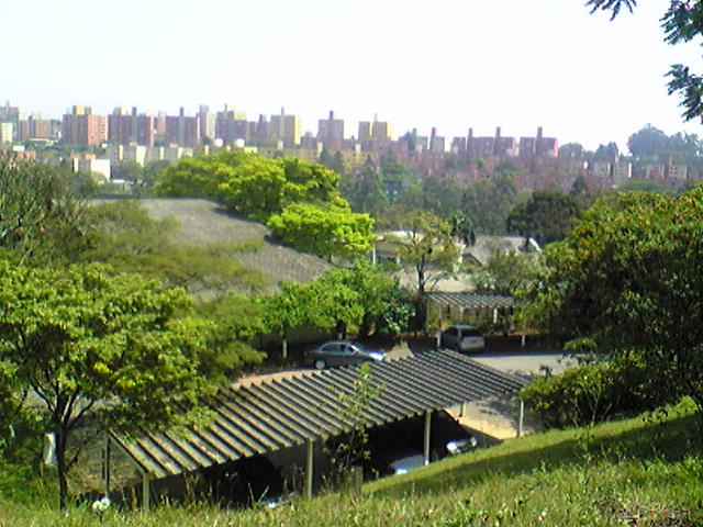 Sao Paulo Japanese School